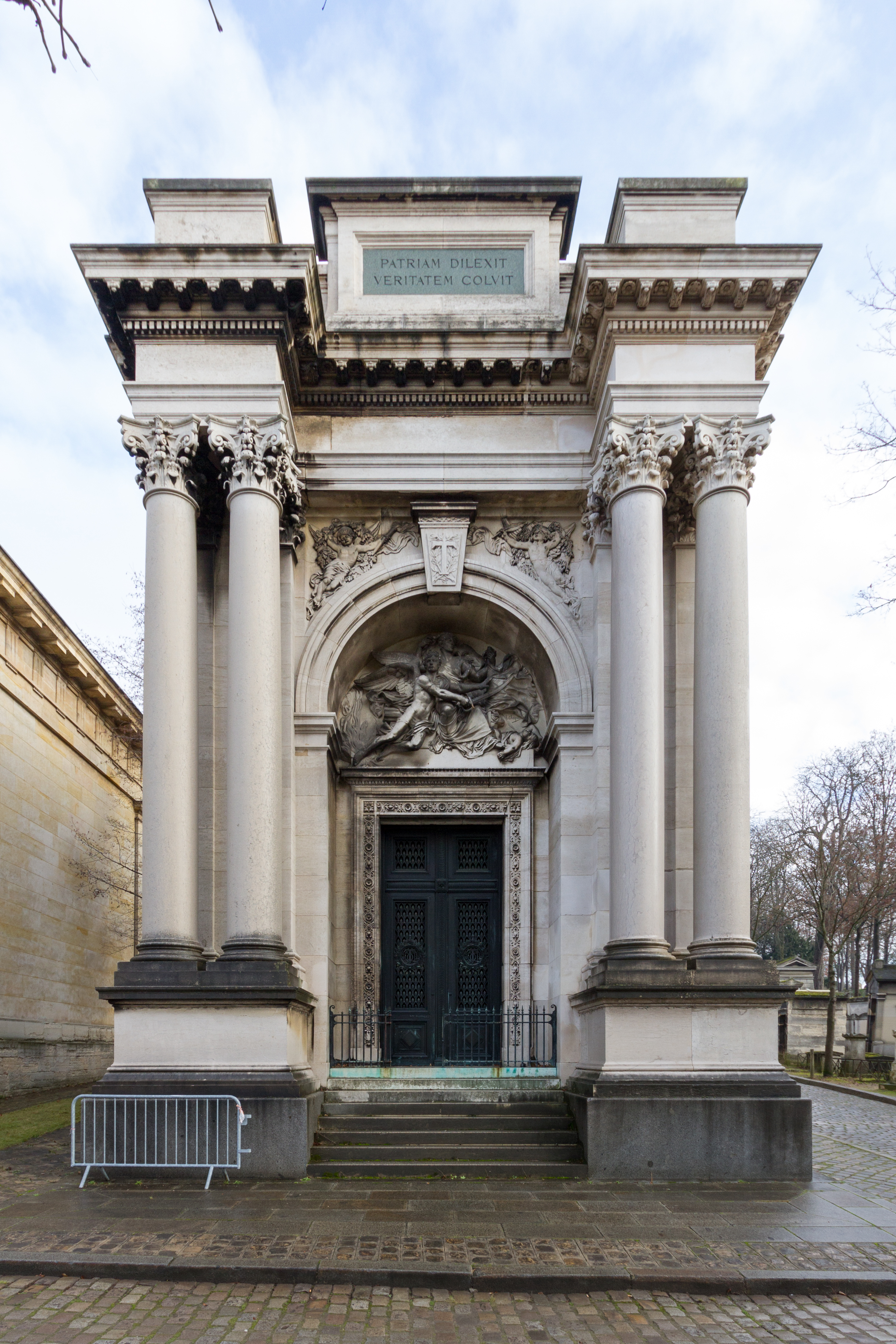 Sépulture de la famille Thiers dont Adolphe Thiers (1797-1877). Monument funéraire de l'architecte Aldrophe, orné d'un relief en marbre représentant le Patriotisme de Chapu et, à l'intérieur, d'une statue représentant l'Immortalité de Mercié. Concession de 152m². Initialement Adolphe Thiers a été enterré dans la chapelle Dosne-Thiers, avenue des Acacias, près de la tombe d'Étienne-Renaud-Augustin Serres.